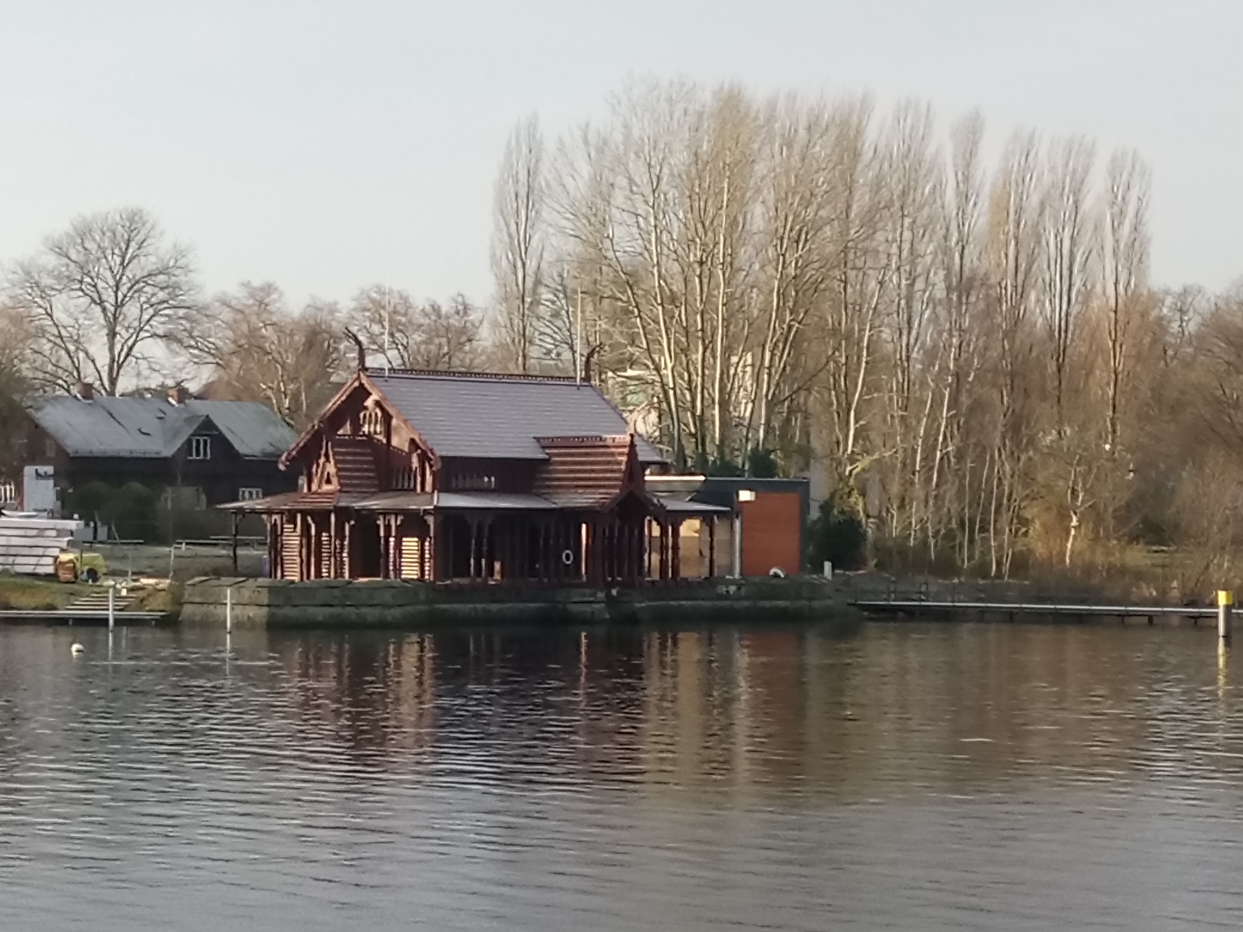 Baustelle Matrosenstation am Jungfernsee Anfang Dezember 2017.